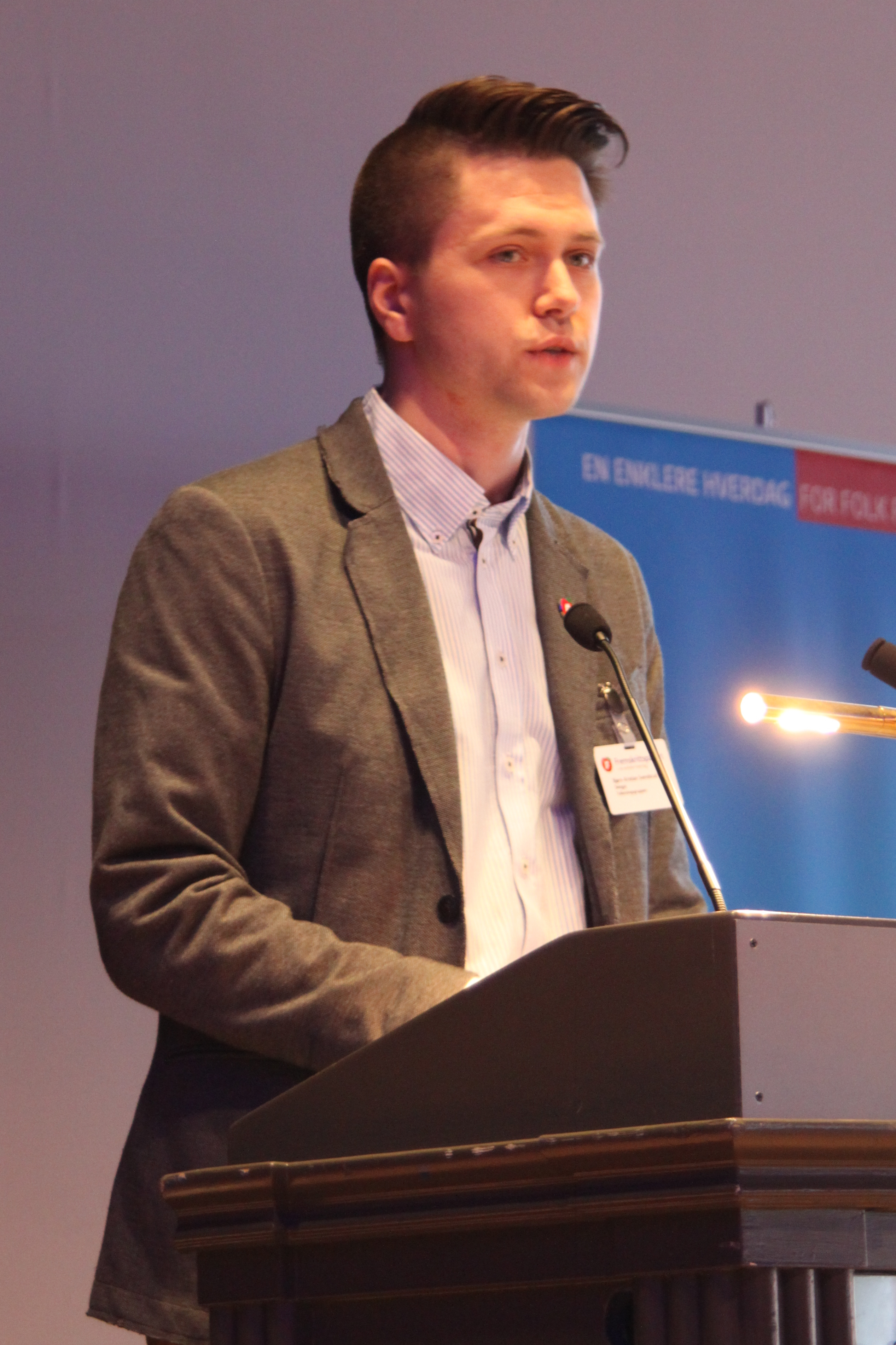 Bjørn-Kristian Svendsrud på talerstolen under Vestfold FrPs fylkesårsmøte 2016